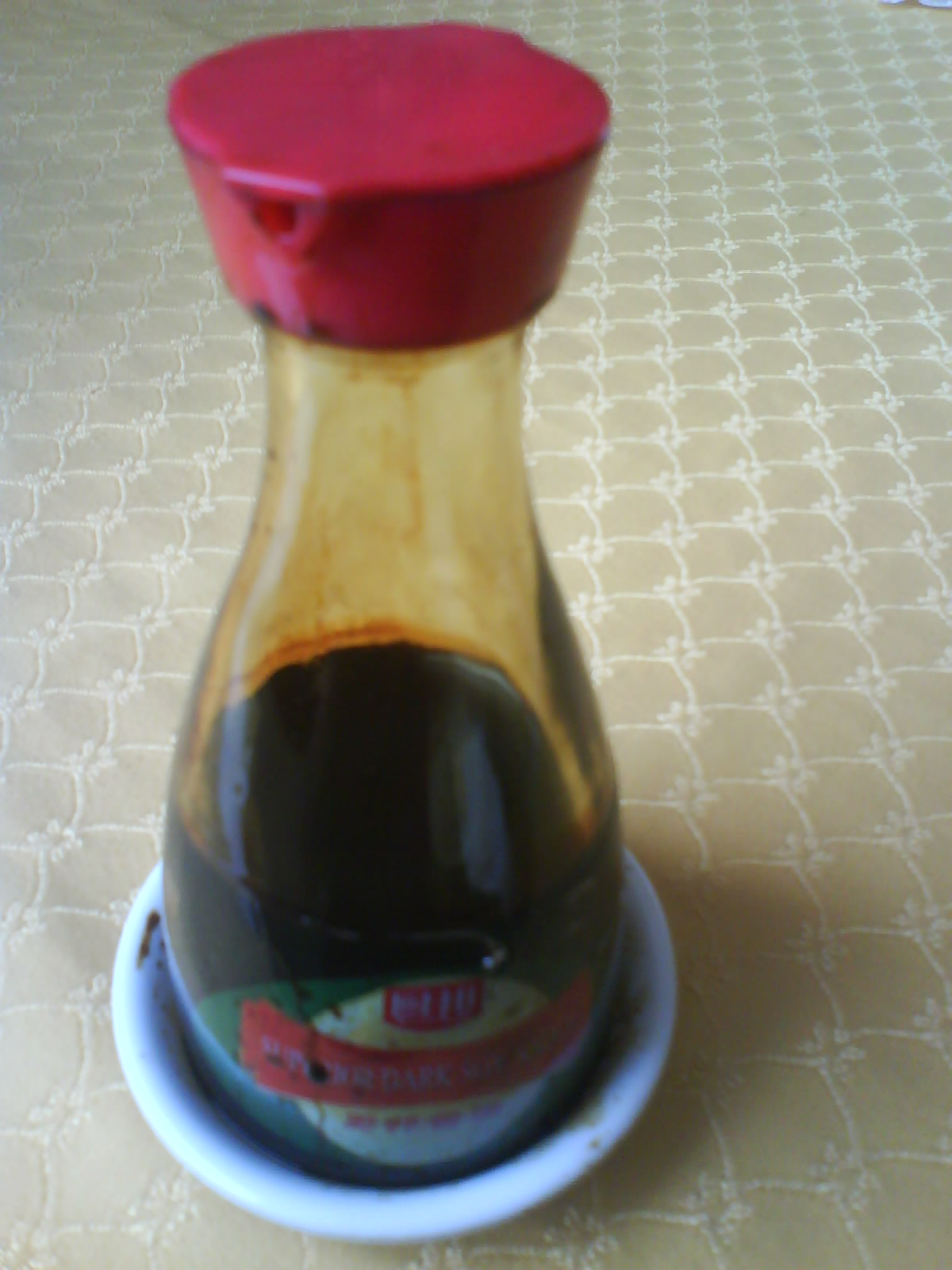 Un envase de sillado.